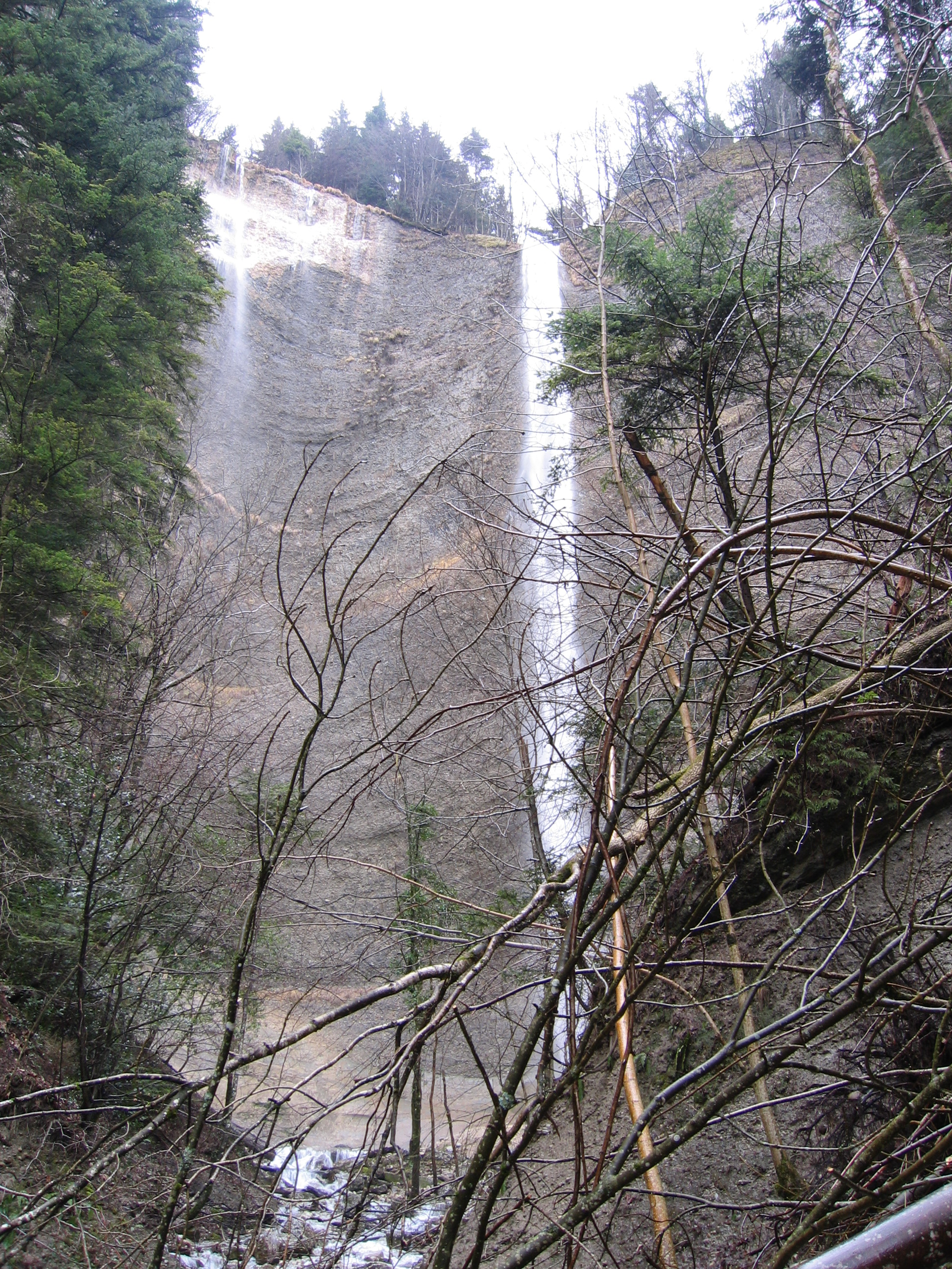 je suis l'auteur. Cascade en Chartreuse